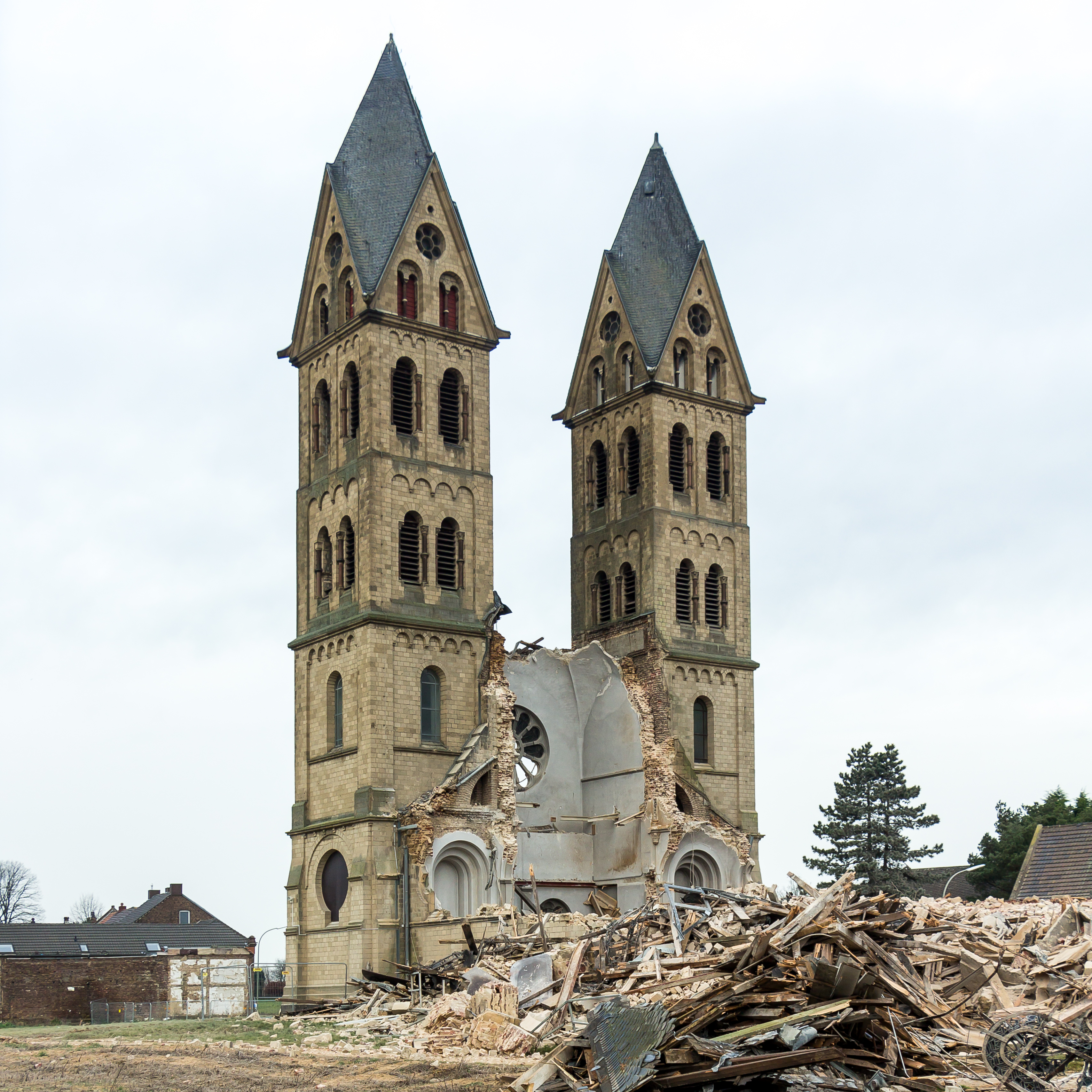 Abriss Immerather Dom, St. Lambertus